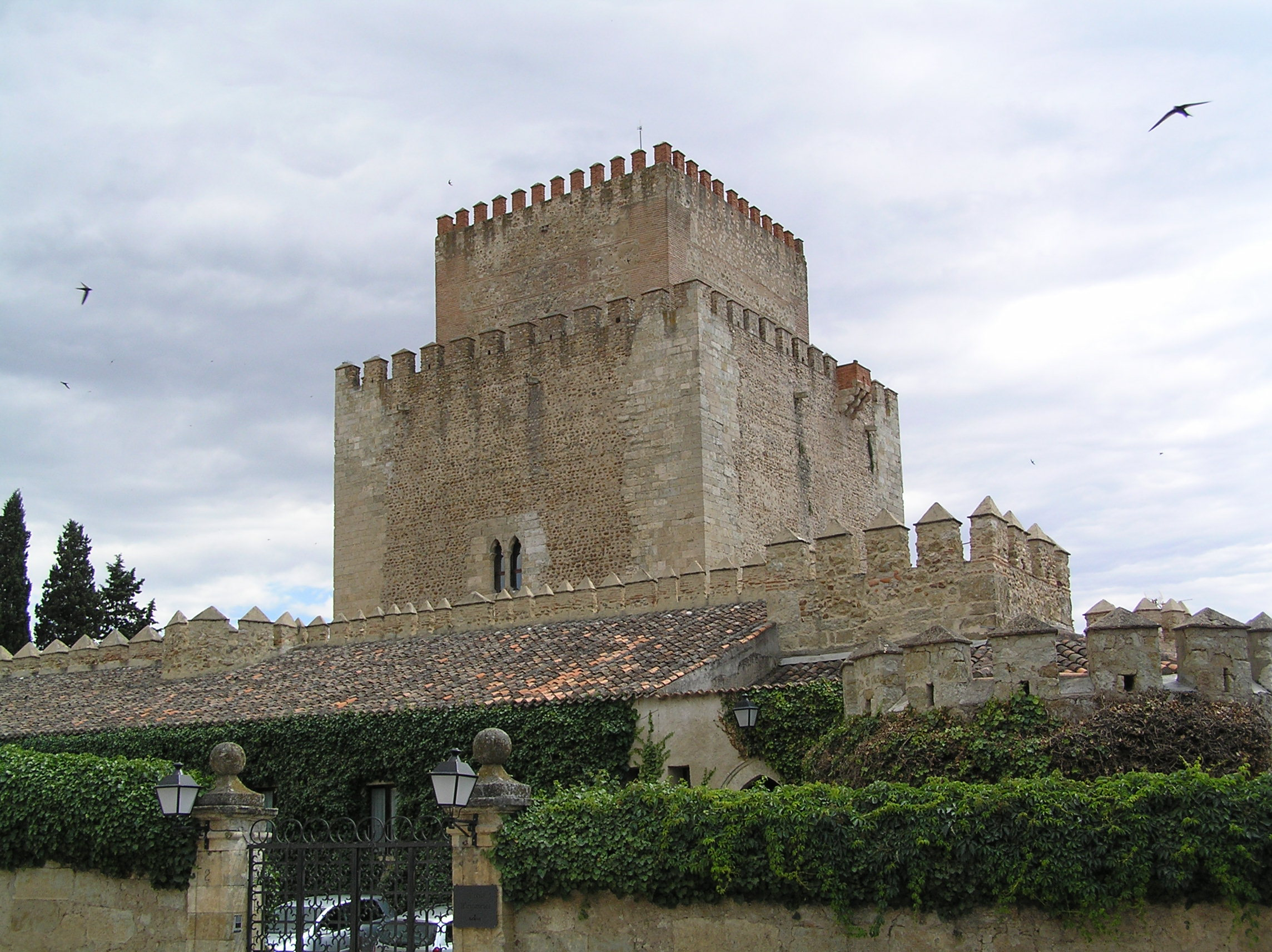 Torre del Homenaje del Castillo de Enrique II desde la Plaza del Castillo, con barrera de 1507 en primer plano. Ciudad Rodrigo (provincia de Salamanca, España)